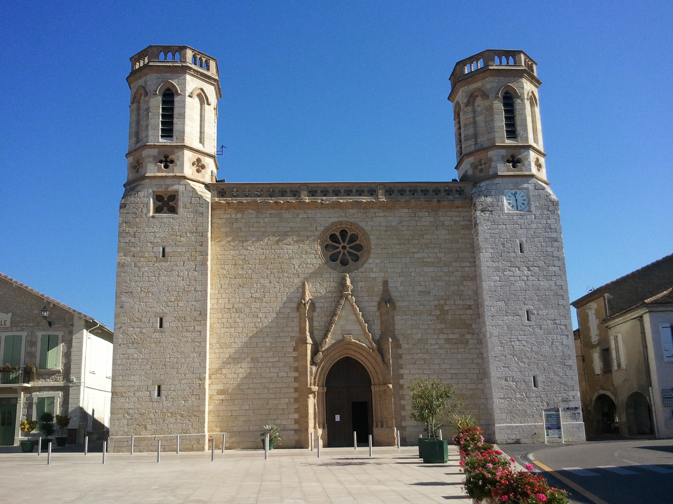 Eglise de Valence sur Baïse